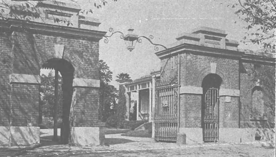 1912年撮影の英国大使館